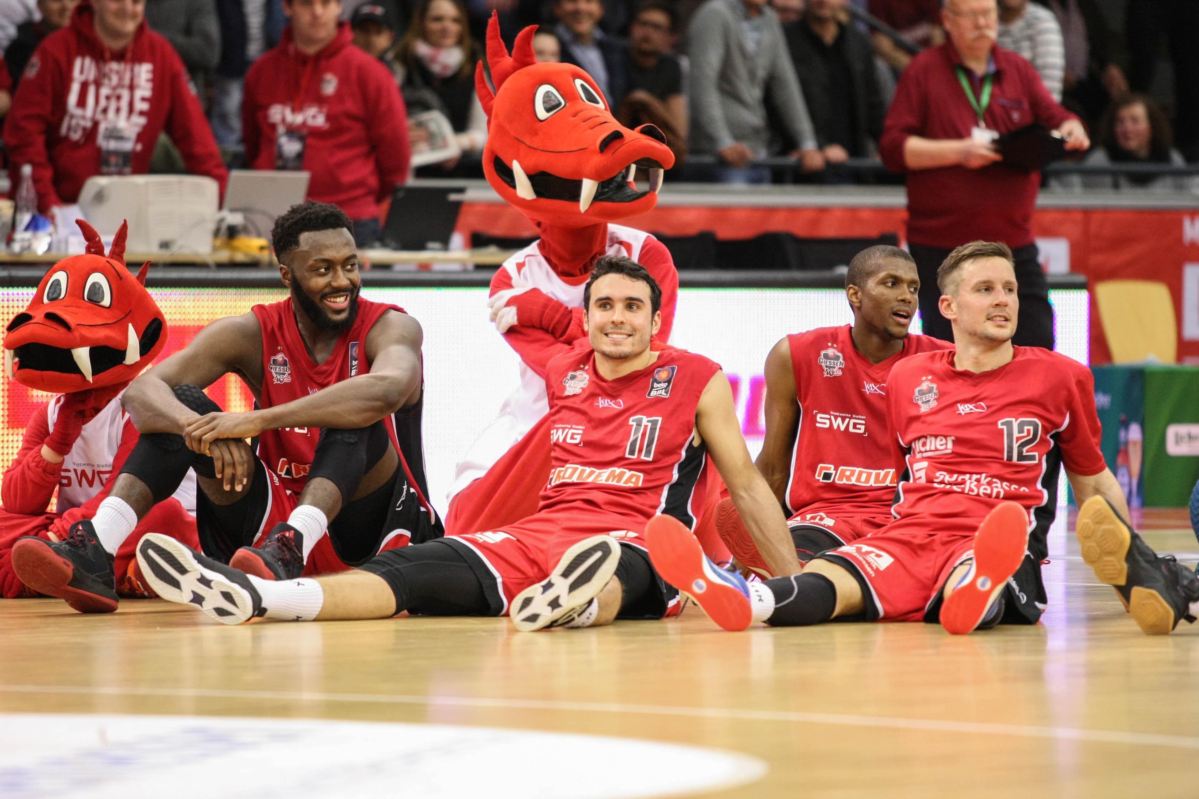 Giessen 46ers / Basketball Löwen Braunschweig (73-71)